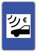 simbolo de entrada numa autoestrada portuguesa com pórticos eletrónicos